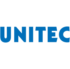 Logo de la Universidad Tecnológica de México